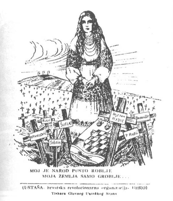 Ustaški letak povodom ubistva hrvatskih poslanika u skupštini Kraljevine Jugoslavije.